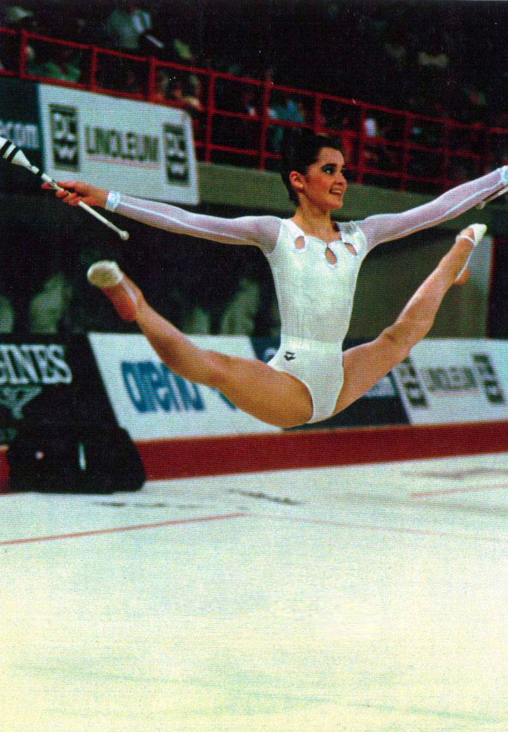 Alba Caride en el Europeo de Patras en 1997.